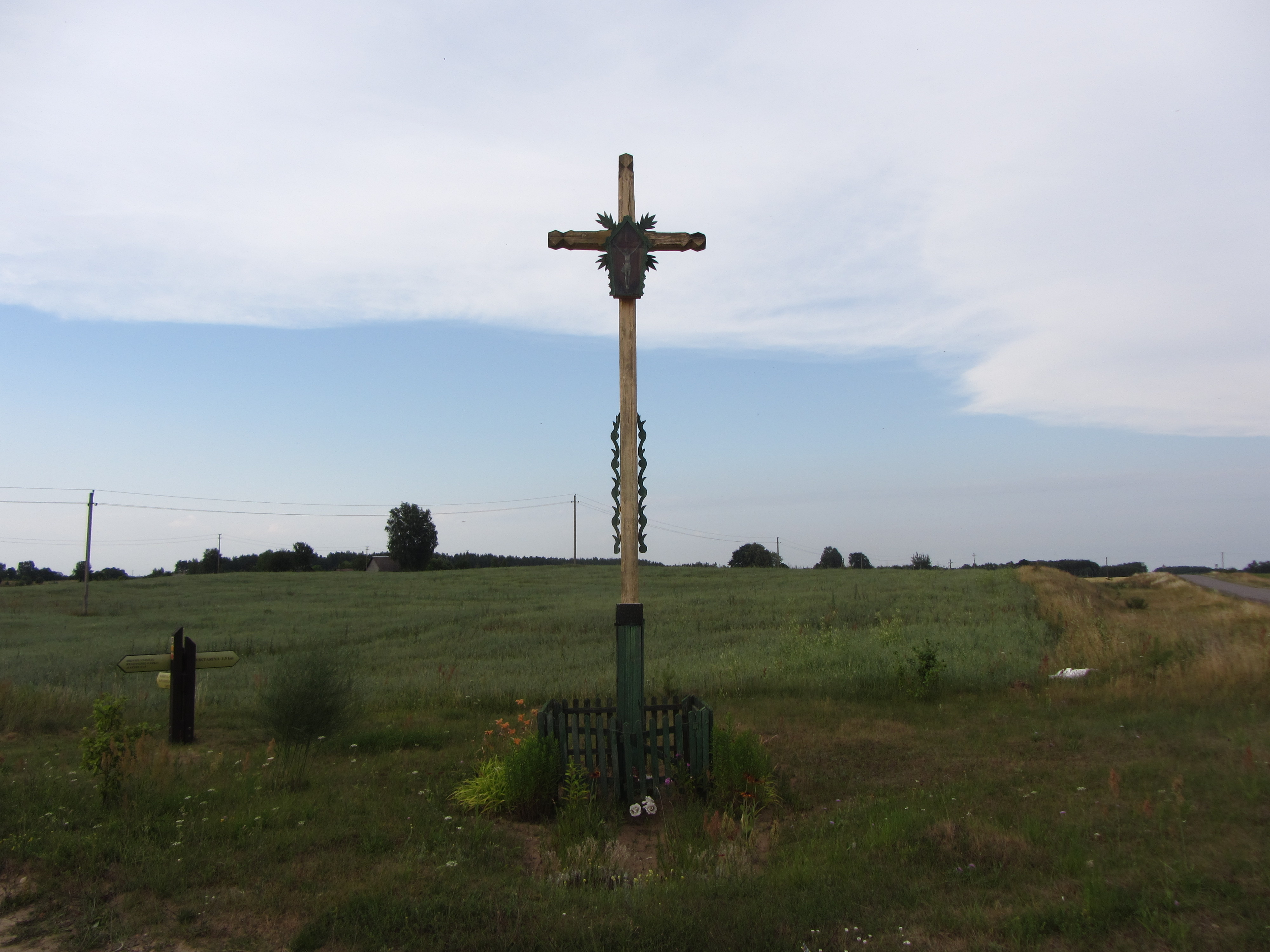 Veisiejų sen., Lithuania